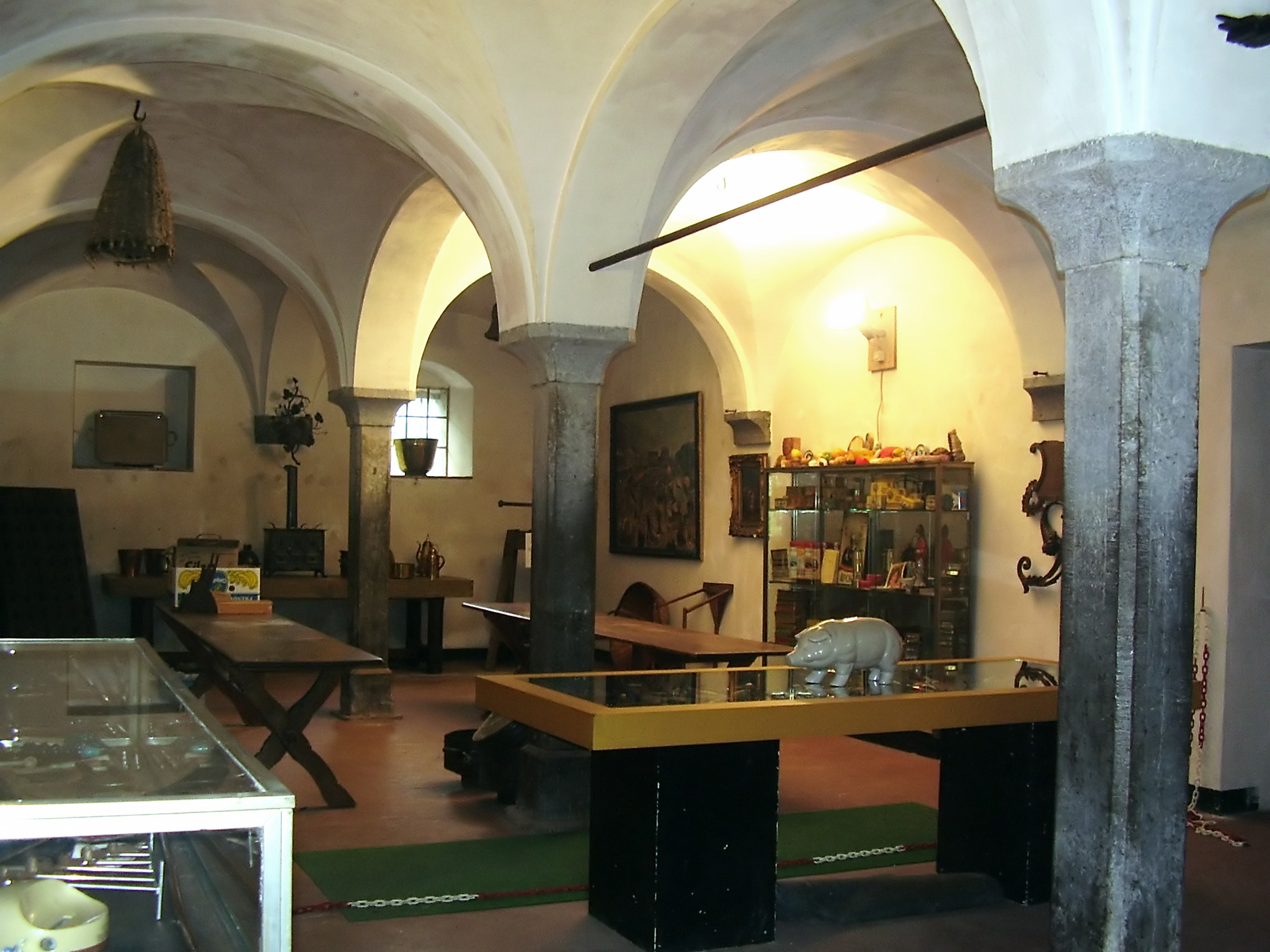 Une salle du musée de la Gourmandise